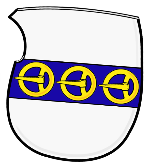 Erb rodu Leslie